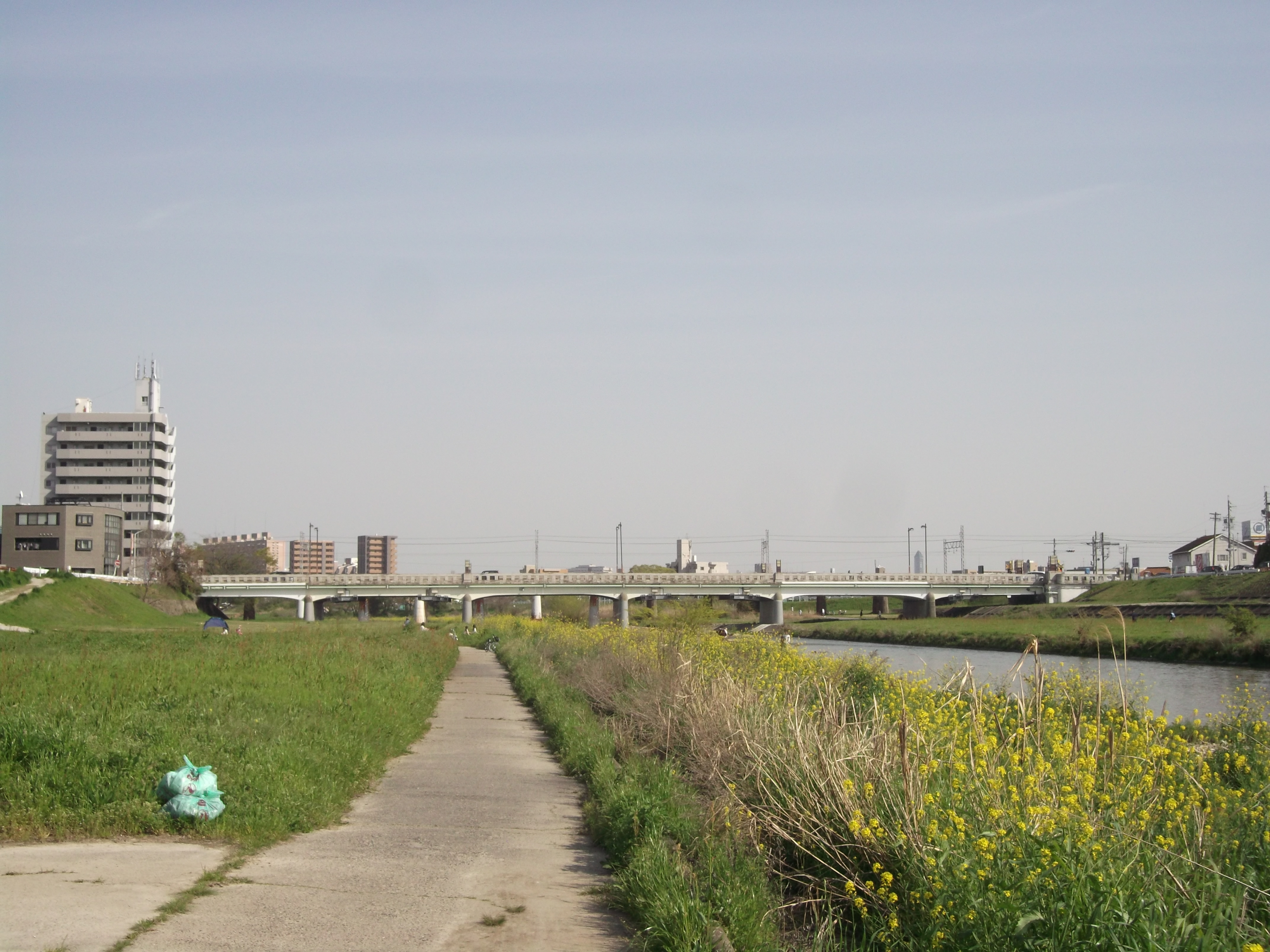 名古屋市守山区・北区の矢田川橋を北東側より撮影